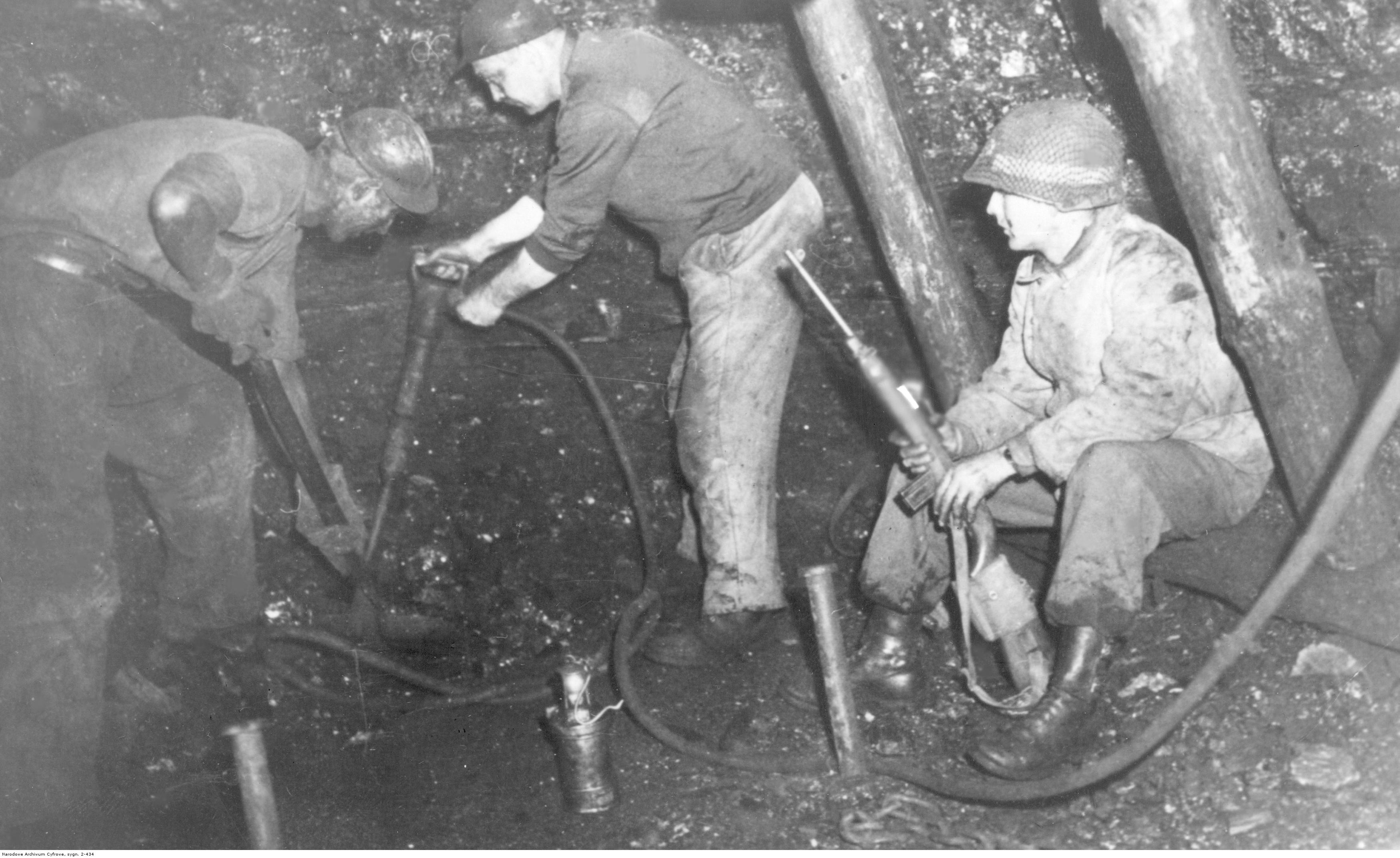 Kopalnia węgla w Alsdorf po zdobyciu przez wojska amerykańskie. Żołnierz amerykański Ronald H. Meade, uzbrojony w karabinek M1, pilnuje dwóch górników - robotników przymusowych podczas fedrowania.